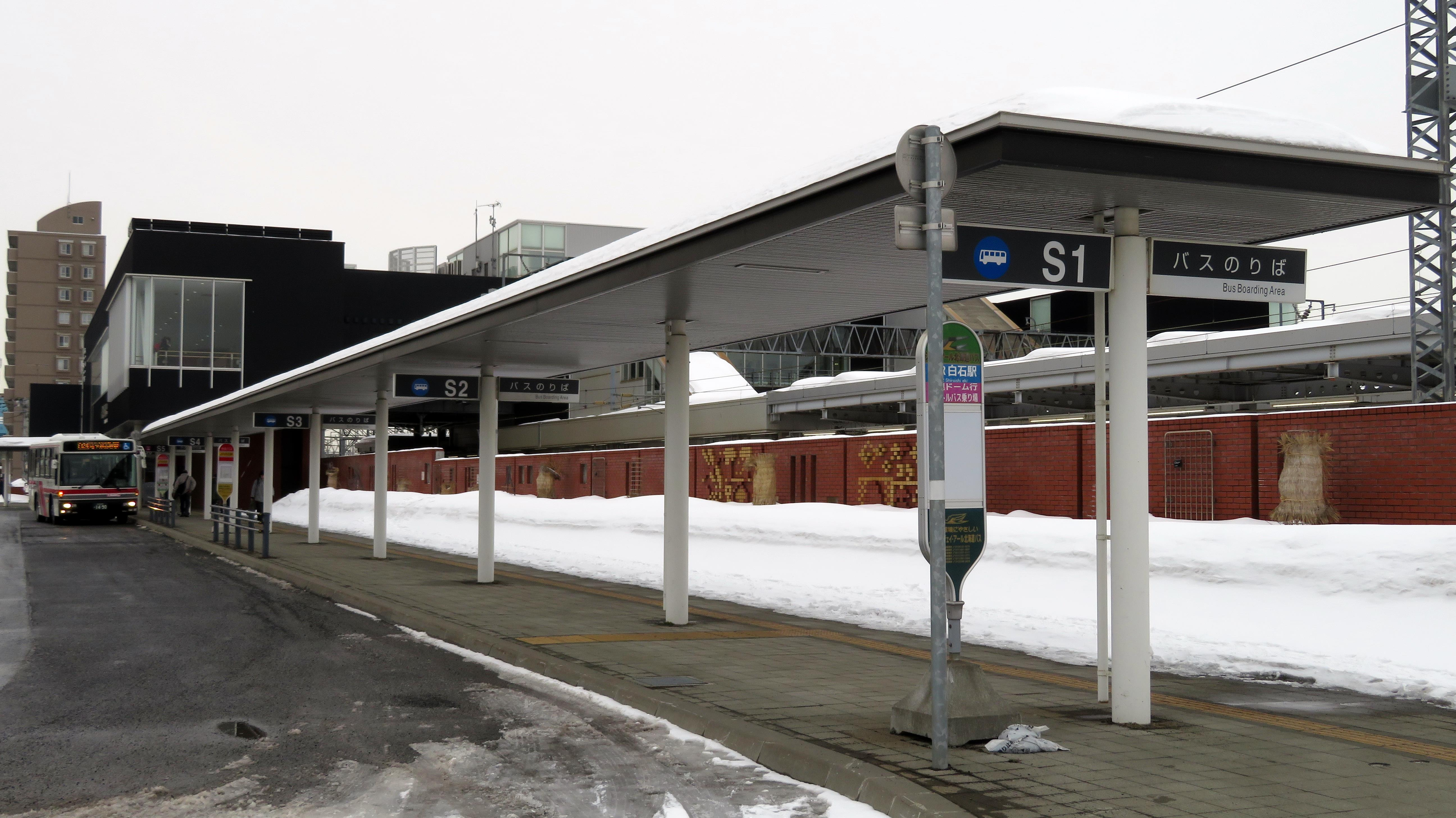 JR白石駅南口バスのりば Canon PowerShot SX720 HS